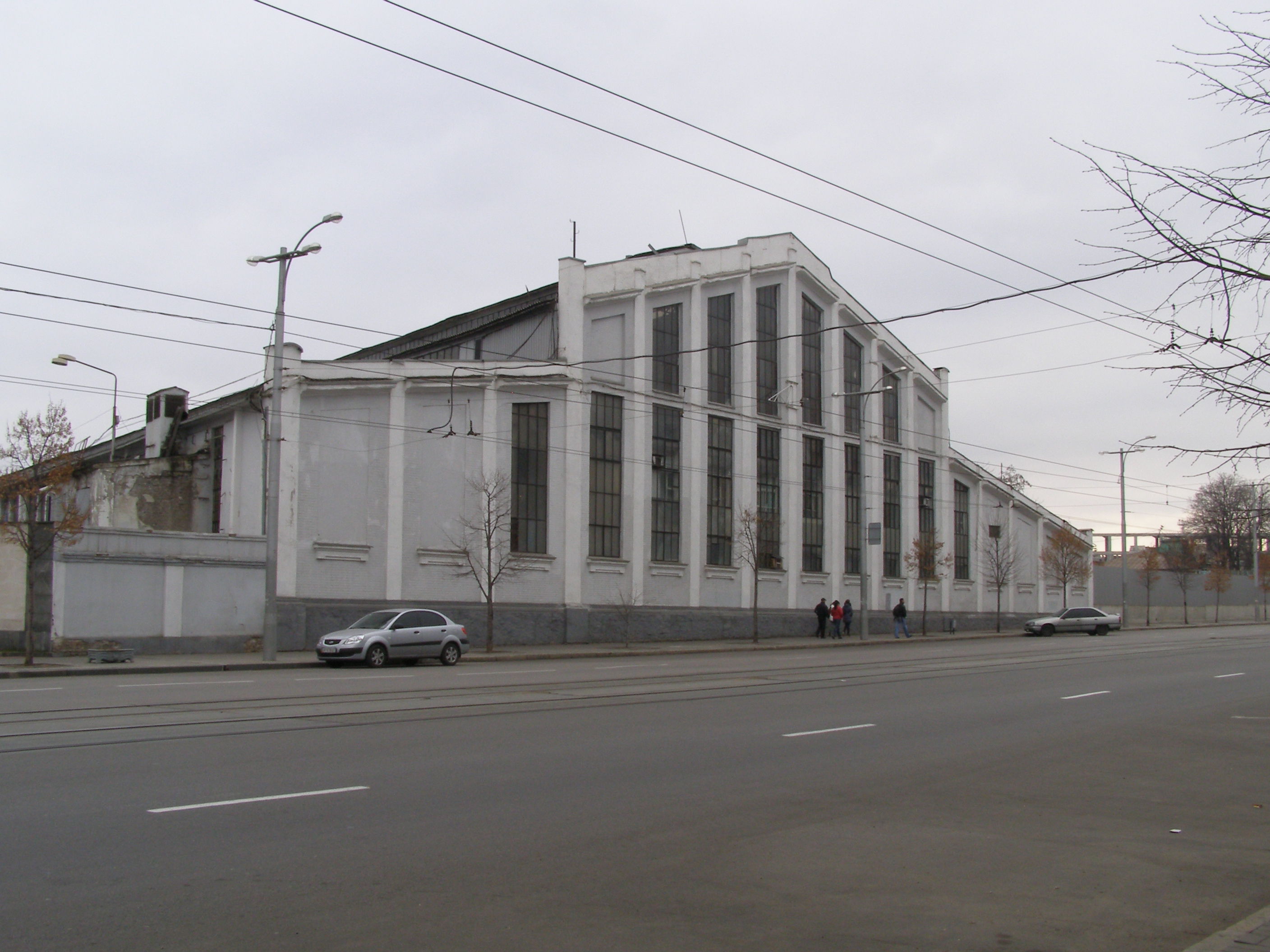 Ковальський цех заводу «Комунар», Запоріжжя, просп. Леніна